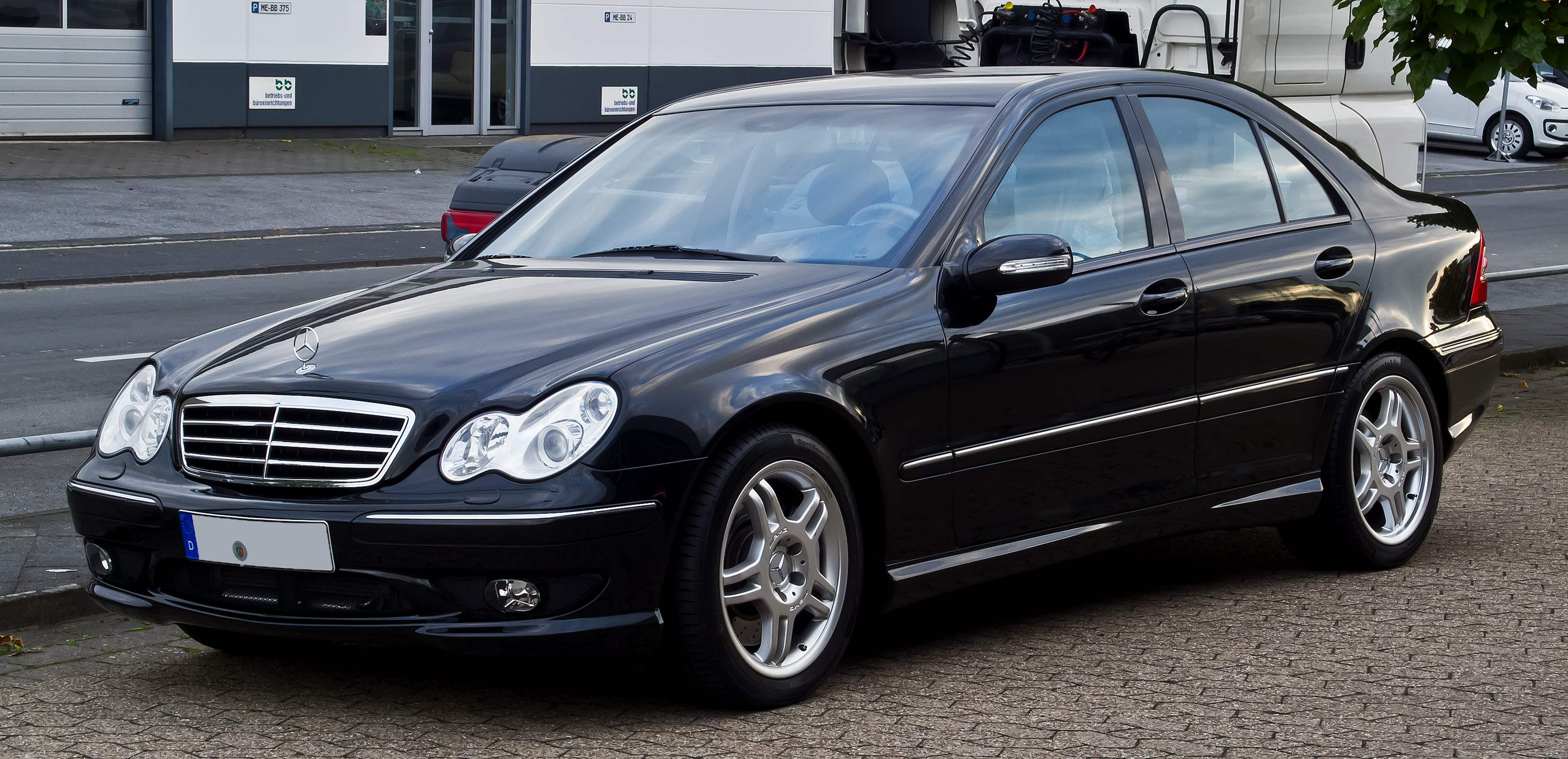 Mercedes-Benz C 30 CDI AMG (W 203, Facelift)